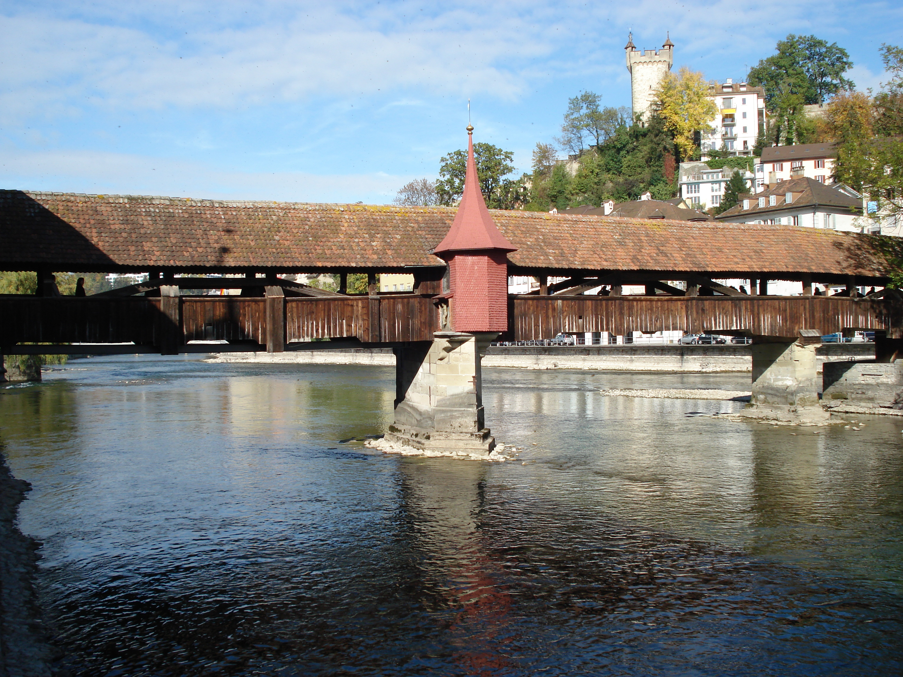 Luzern - Spreuerbrücke (Altstadt)